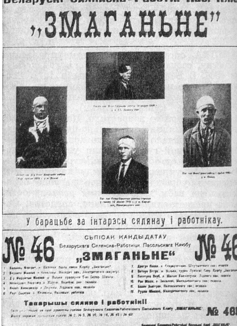 Плакат политической партии Змагання